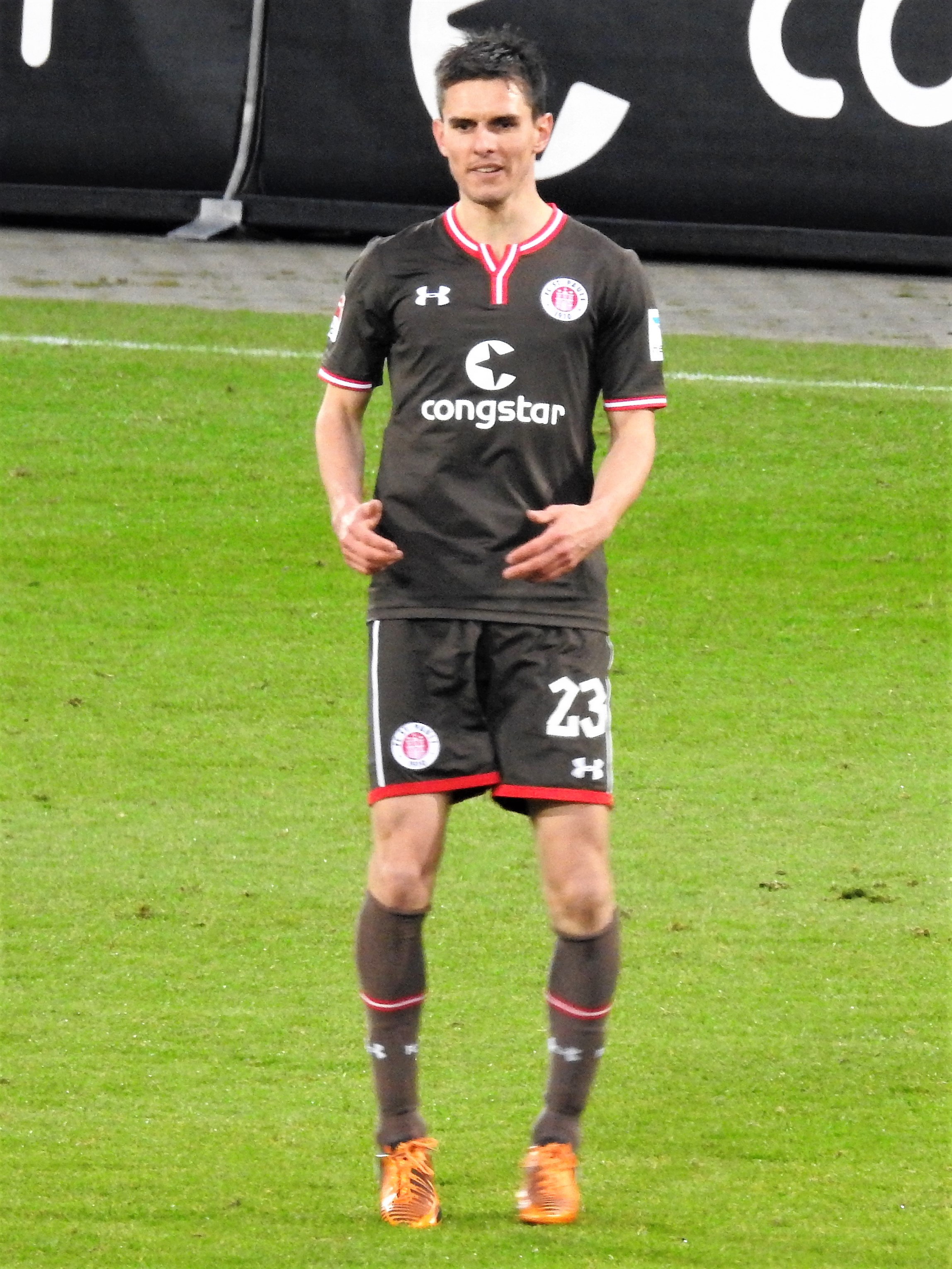 Johannes Flum beim FC St.Pauli